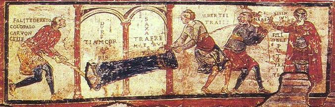 Roma, Basilica di San Clemente, cripta. Affresco che narra il miracolo secondo il quale il patrizio pagano Sisinnio, geloso di San Clemente, lo fa legare e trascinare da tre suoi servi (Gosmario, Albertello e Carboncello) ma il santo si trasforma in una pesantissima colonna. Accanto ai personaggi sono indicati i loro nomi e quello che essi dicono (in volgare). Sisinium: «Fili dele pute, traite» (Figli di puttane, tirate!) Gosmarius: «Albertel, trai» (Albertello, tira) Albertellus: «Falite dereto colo palo, Carvoncelle» (Vagli dietro col palo, Carboncello). Le parole di San Clemente (in latino) recitano invece: Sisinium: «Duritia cordis tui in saxa conversa est, et cum saxa deos aestimatis saxa traere meruistis» (La durezza del tuo cuore si è tasformata in sassi, e dal momento che tu ritieni che gli dèi siano sassi, hai meritato di trascinare sassi»).